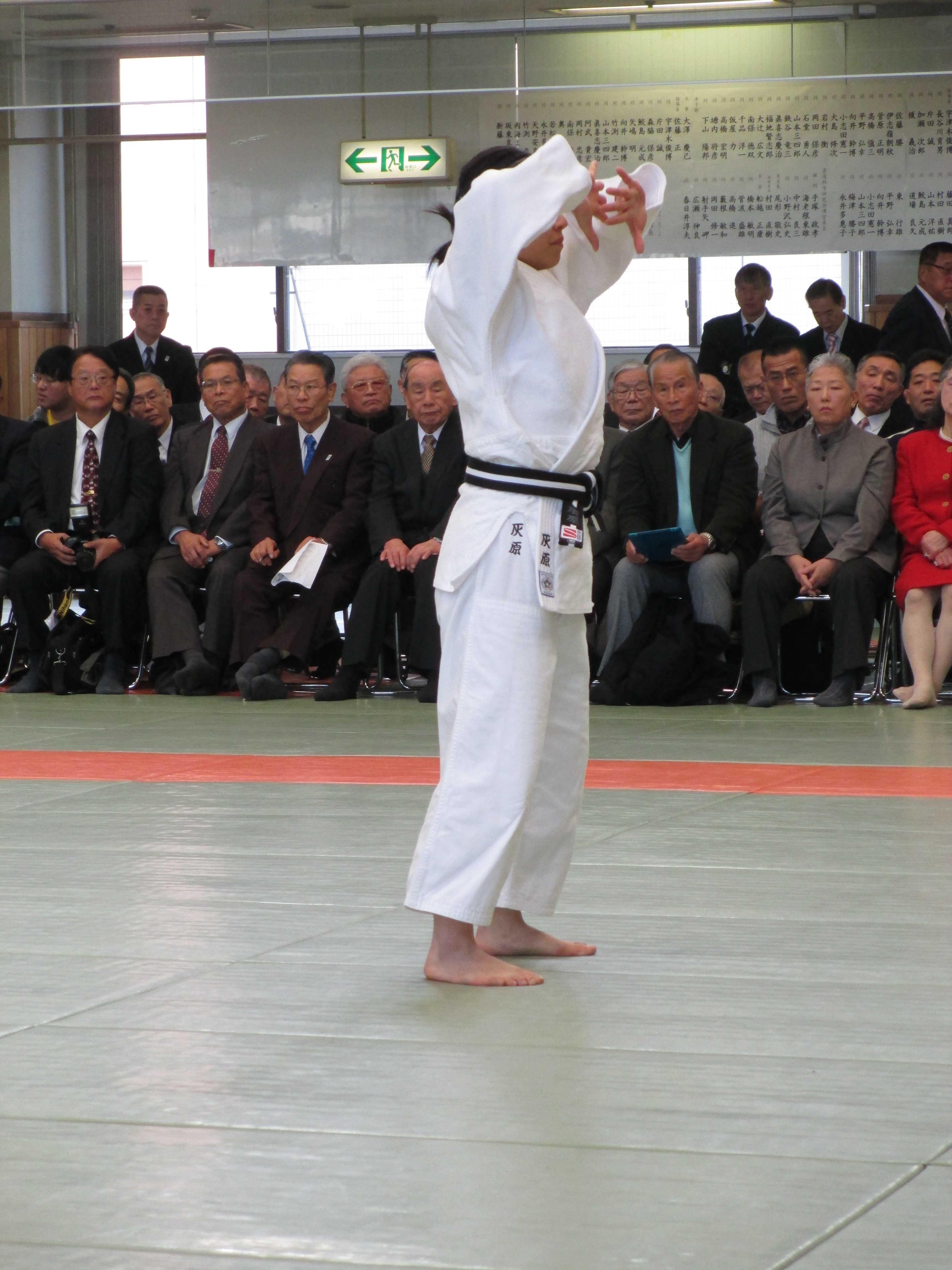 精力善用国民体育